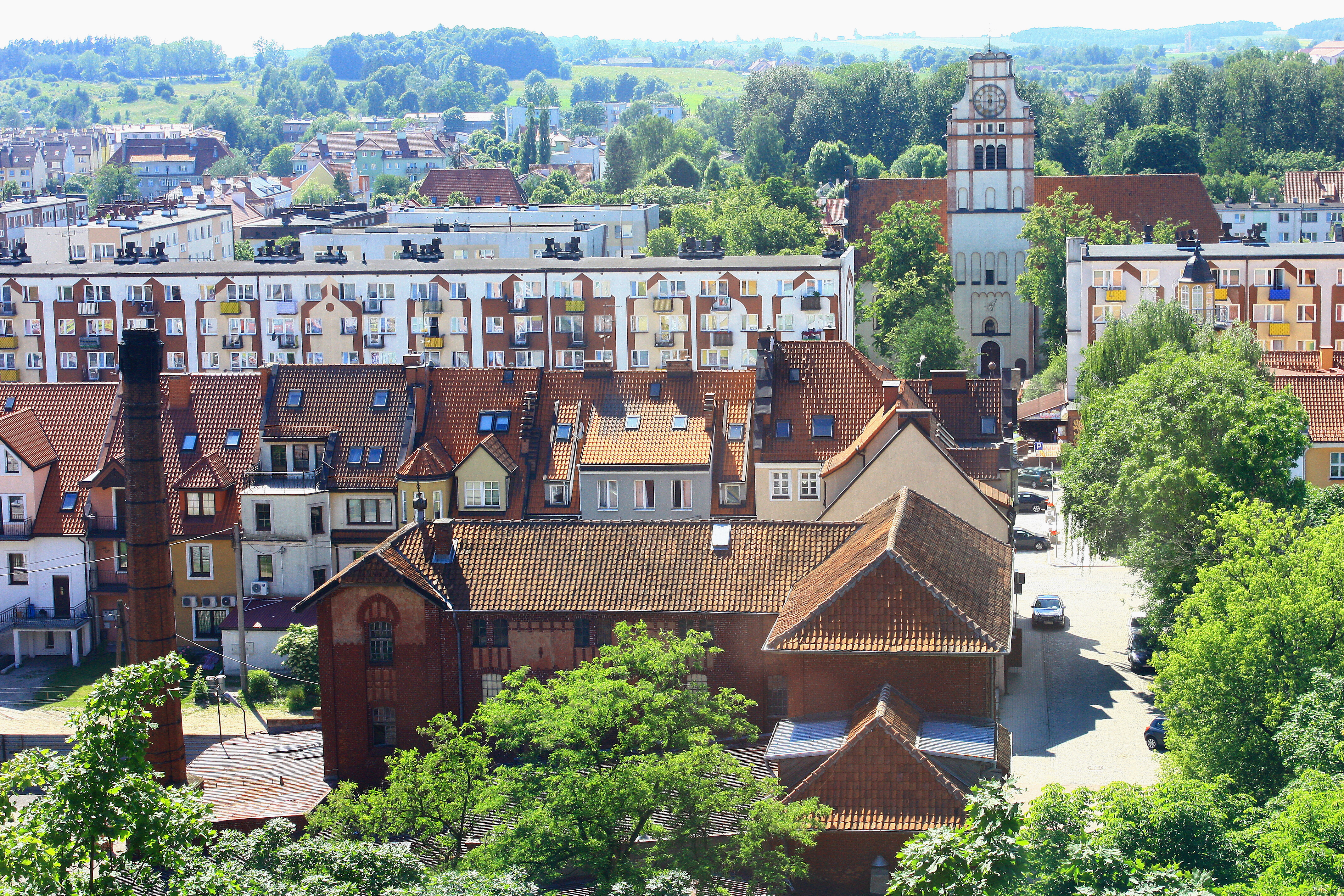 Nidzica, założenie urbanistyczne Starego Miasta w granicach 50-100 m od zewnętrznej linii przebiegu d. obwarowań miejskich i zamkowych, kon. XIV